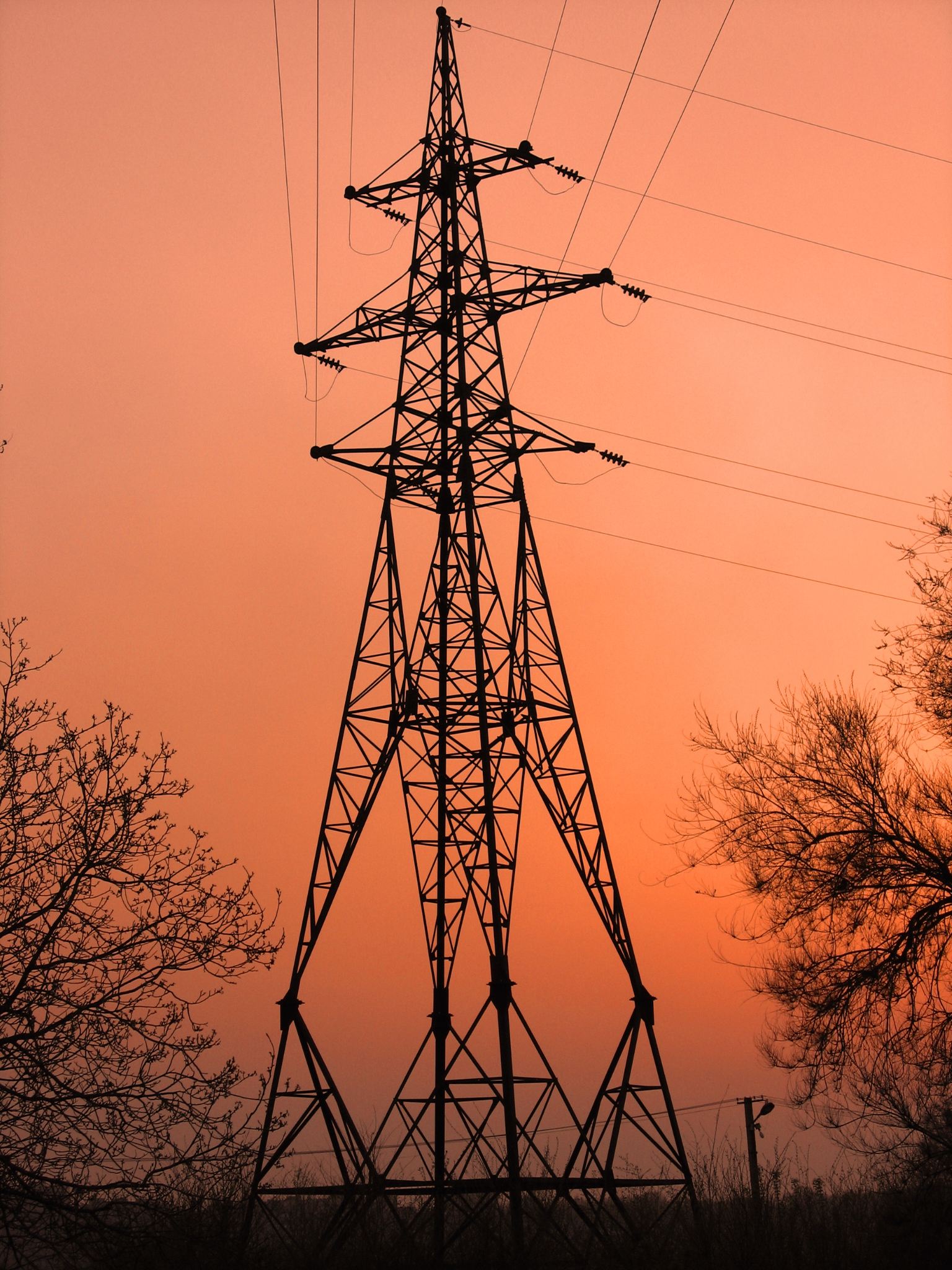 Анкерно-угловая опора ЛЭП 35 кВ. Пересечение воздушной линии с Запорожским шоссе, г. Днепр. Установлена в начале 70-х годов ХХ столетия.